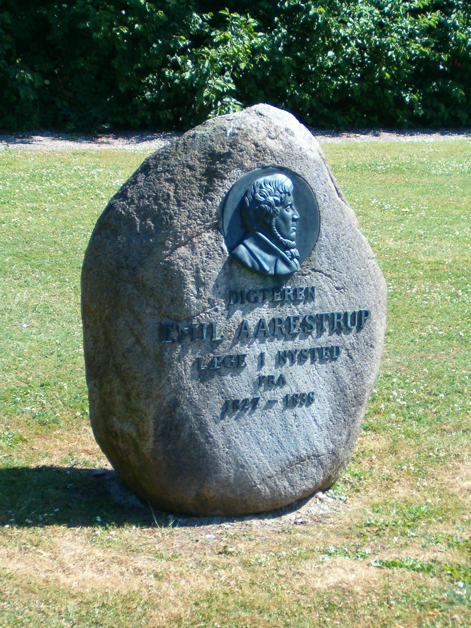 Mindesten over digteren Emil Årestrup på havnen i Nysted